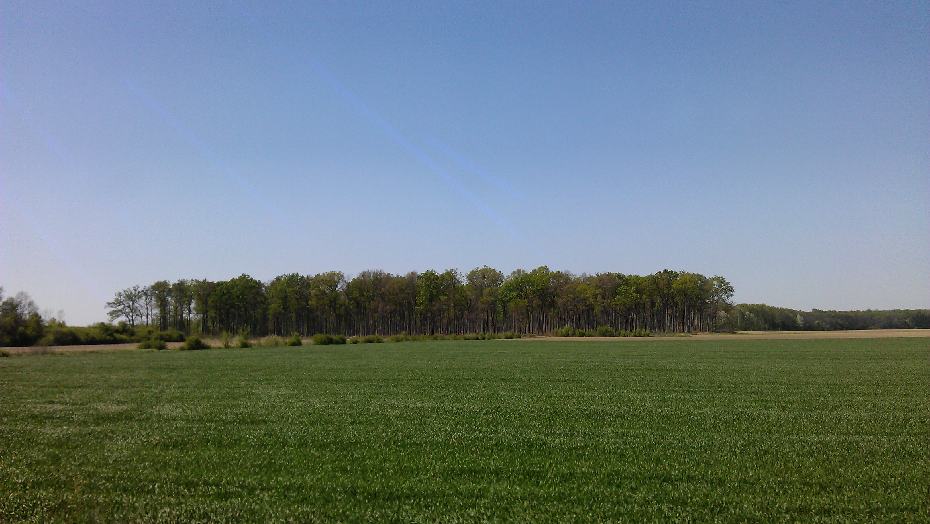 forest